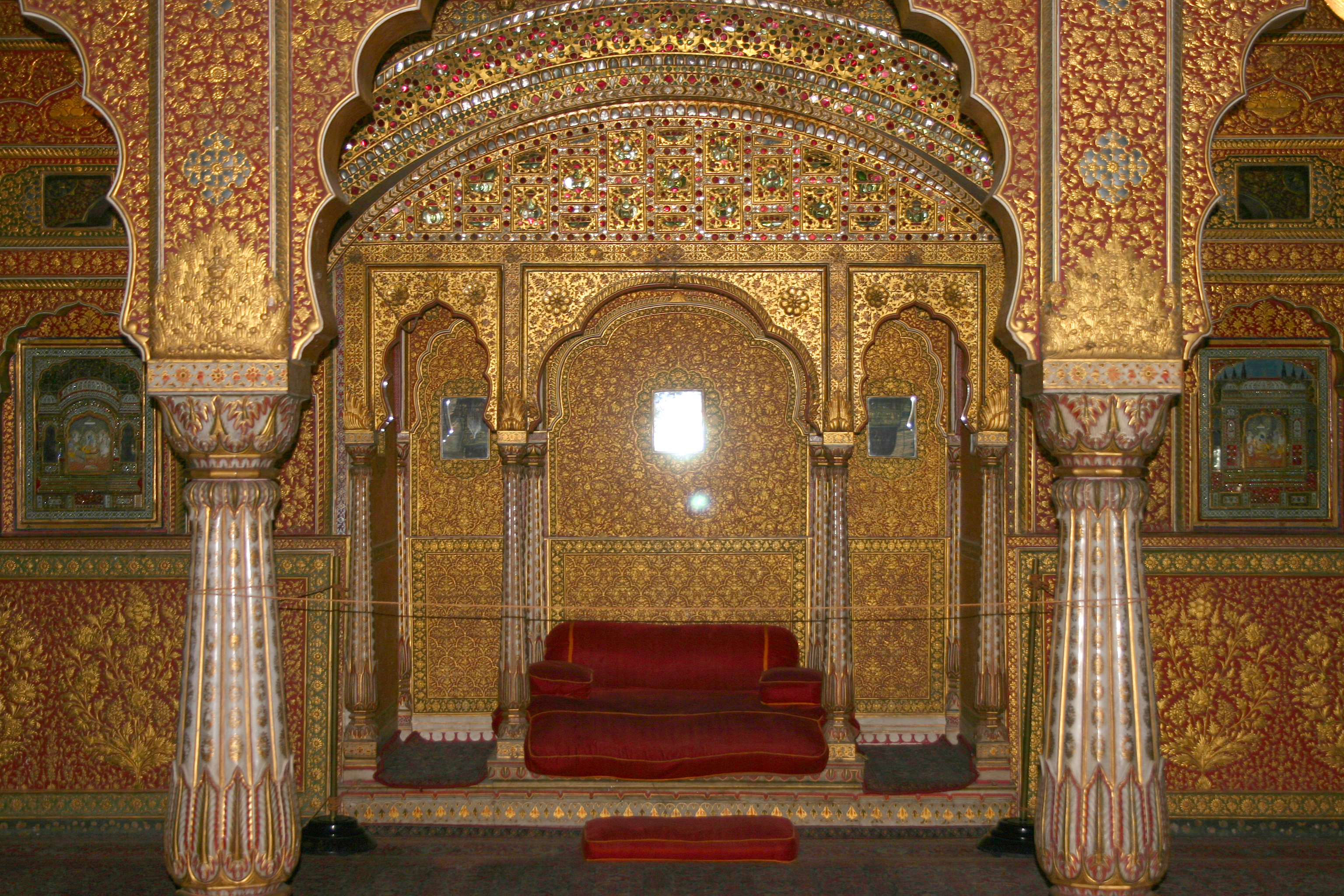 Privater Audienzsaal Anup Mahal im Junagarh Fort in Bikaner / Rajasthan